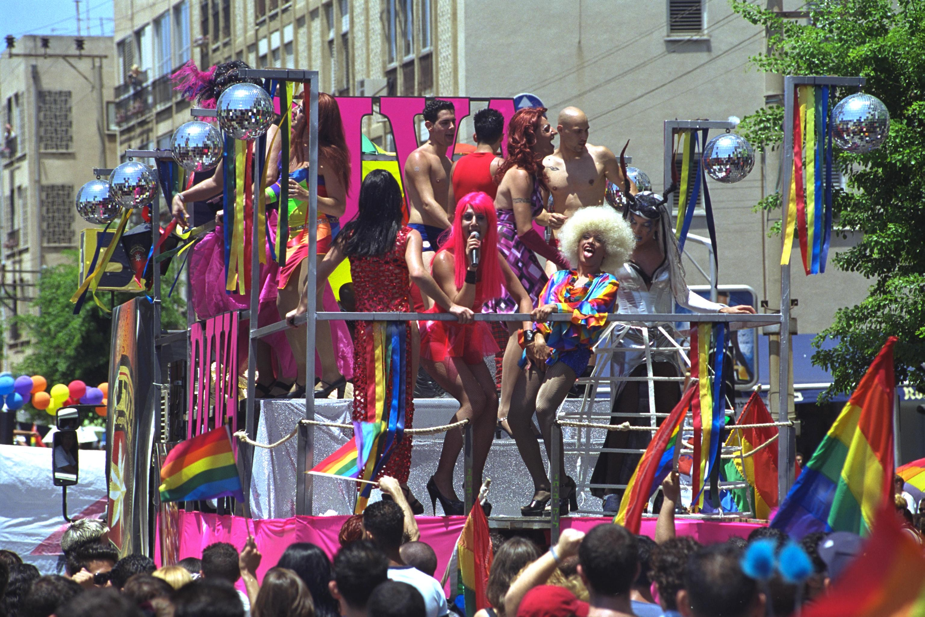 Homosexuals and lesbians transsexuals and bisexuals celebrating their sexuality in the pride parade, tel aviv (22/06/2001) הומואים, לסביות, ביסקסואלים וטרנסקסואלים חוגגים במצעד הגאווה בתל אביב